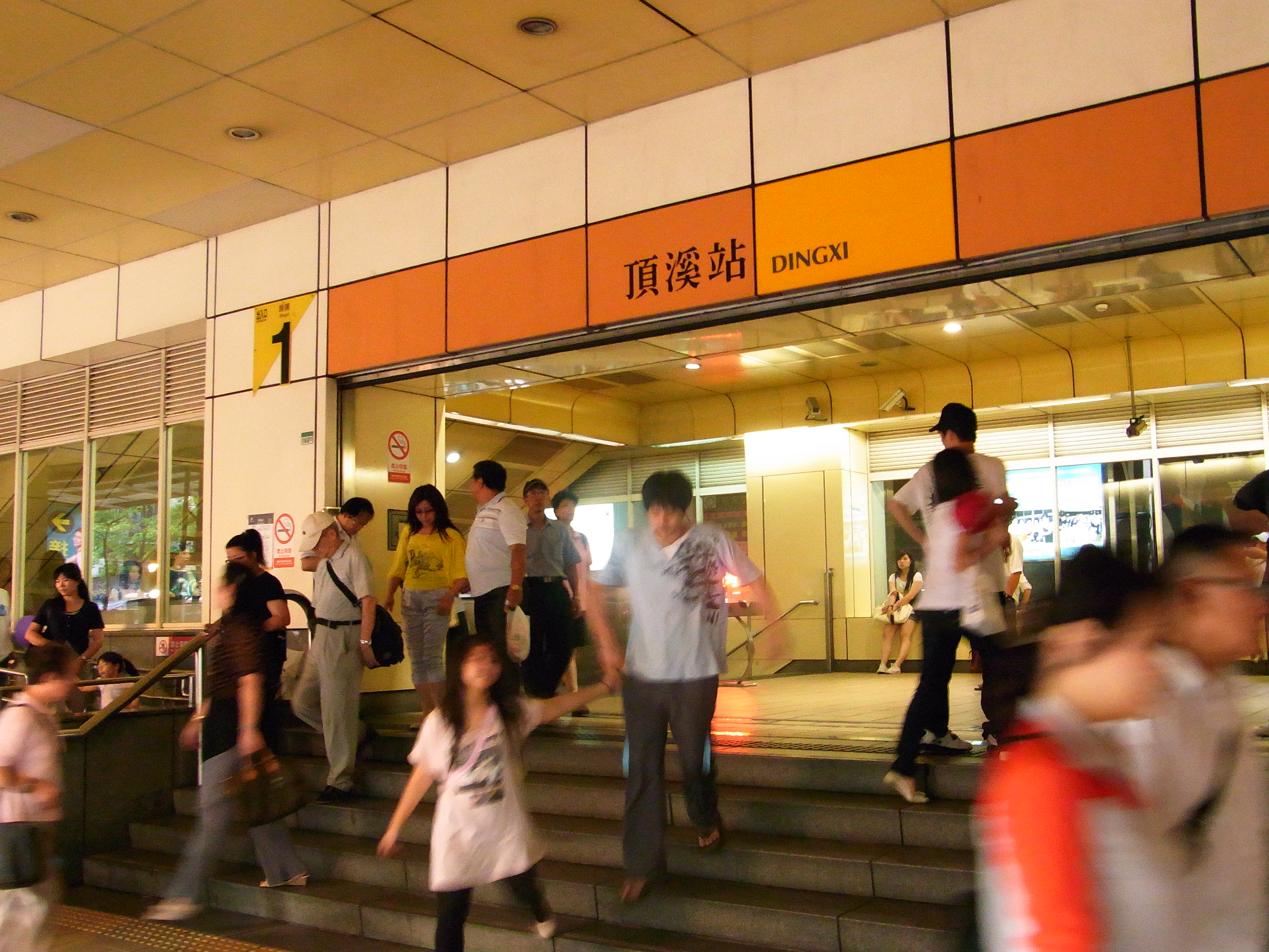 頂溪站出口